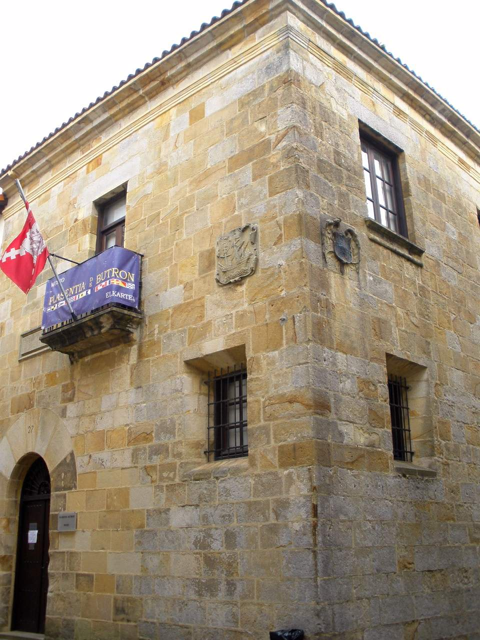 Plencia - El Torreon, antiguo ayuntamiento